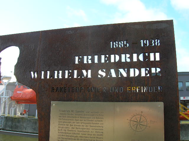 Stahlstele für Friedrich Wilhelm Sander am Hauptkanal in Geestemünde.